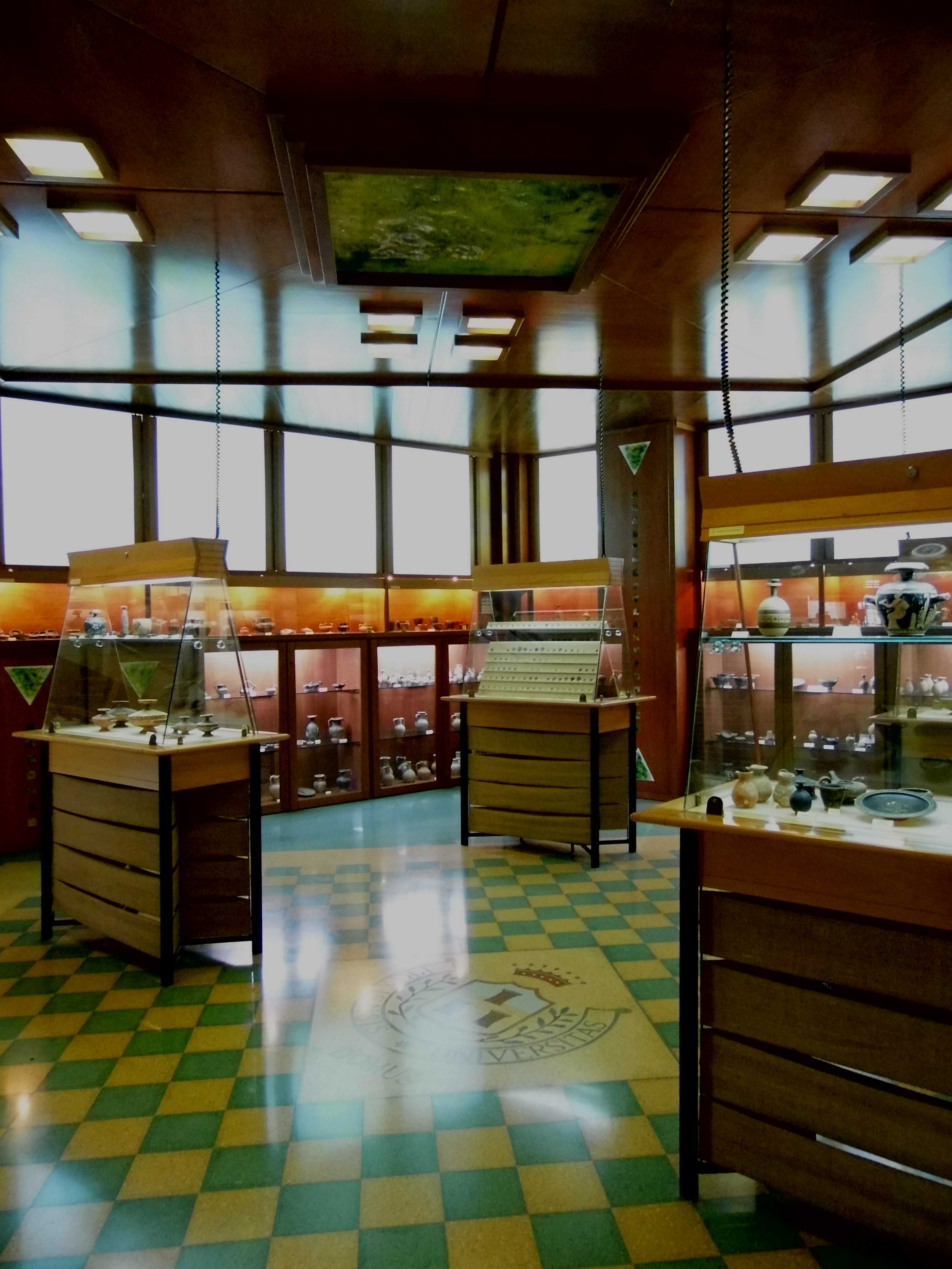 Museo archeologico Hippana This is a photo of a monument which is part of cultural heritage of Italy.